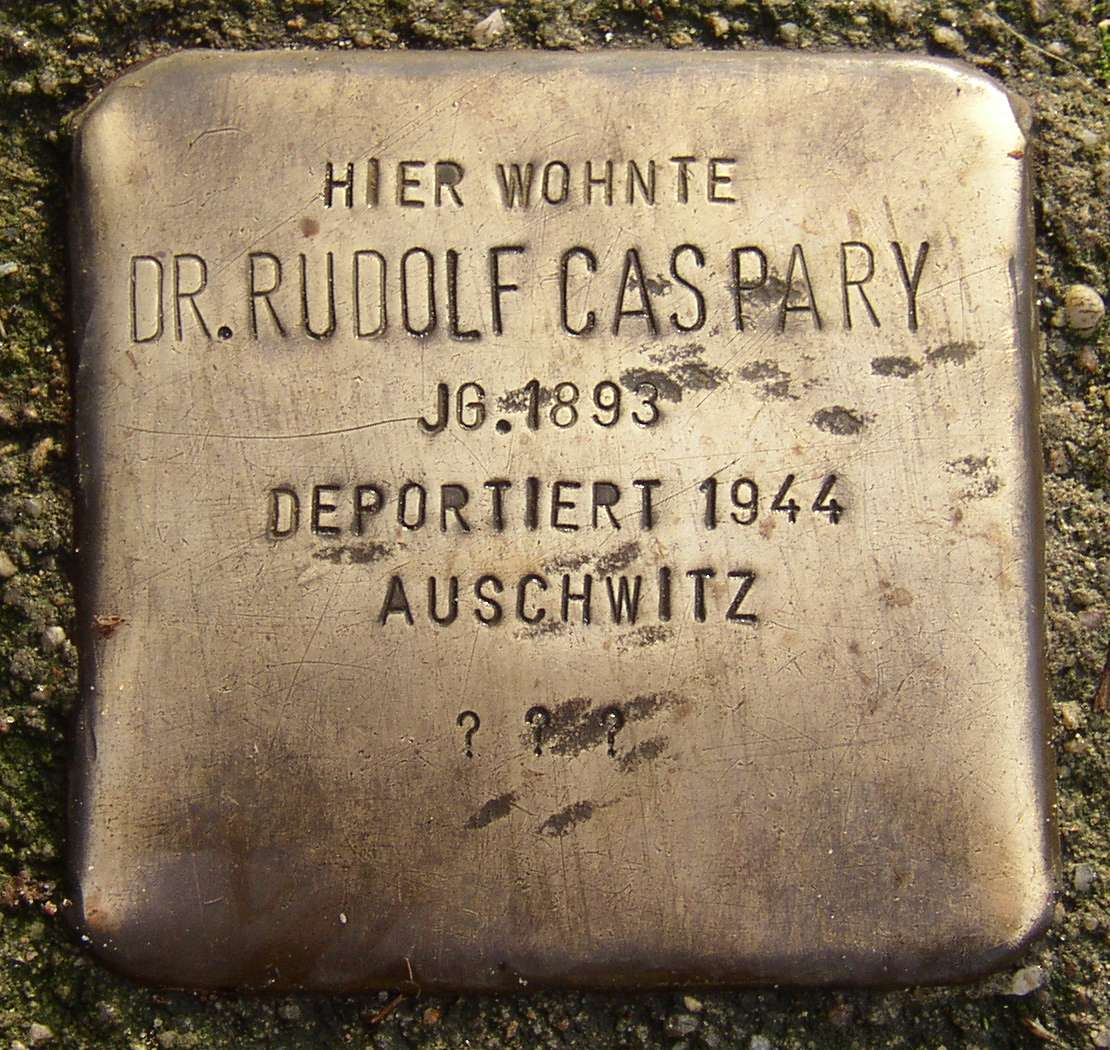 Stolperstein für Dr. Rudolf Caspary (am Grundstück Holsteiner Ufer 2; nordwestl. der Lessingstr. 10, D-10555 Berlin-Hansaviertel, im Bürgersteig an der Treppe zum Spreeufer, Deutschland. Kubischer Betonstein mit einer Kantenlänge von zehn Zentimetern, auf dessen Oberseite eine beschriftete Messingplatte angebracht ist. Stolpersteine sind ein Projekt des Künstlers Gunter Demnig.